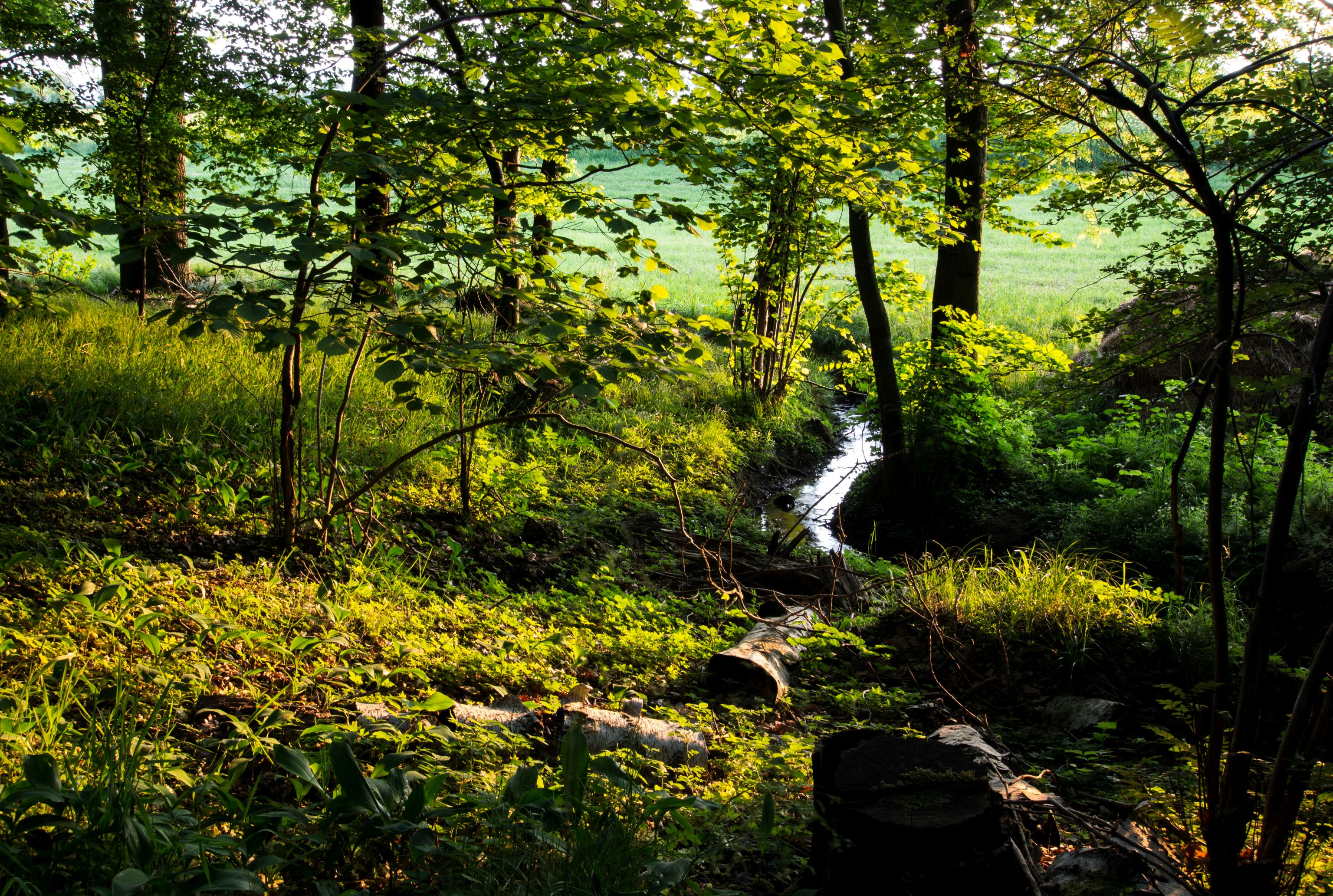 Mischholzforst, Totholz, Farn, Bachlauf an der westlichen Grenze des NSG